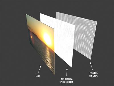 Capa nanoperforada col.locada entre el panell LCD i el panell de leds